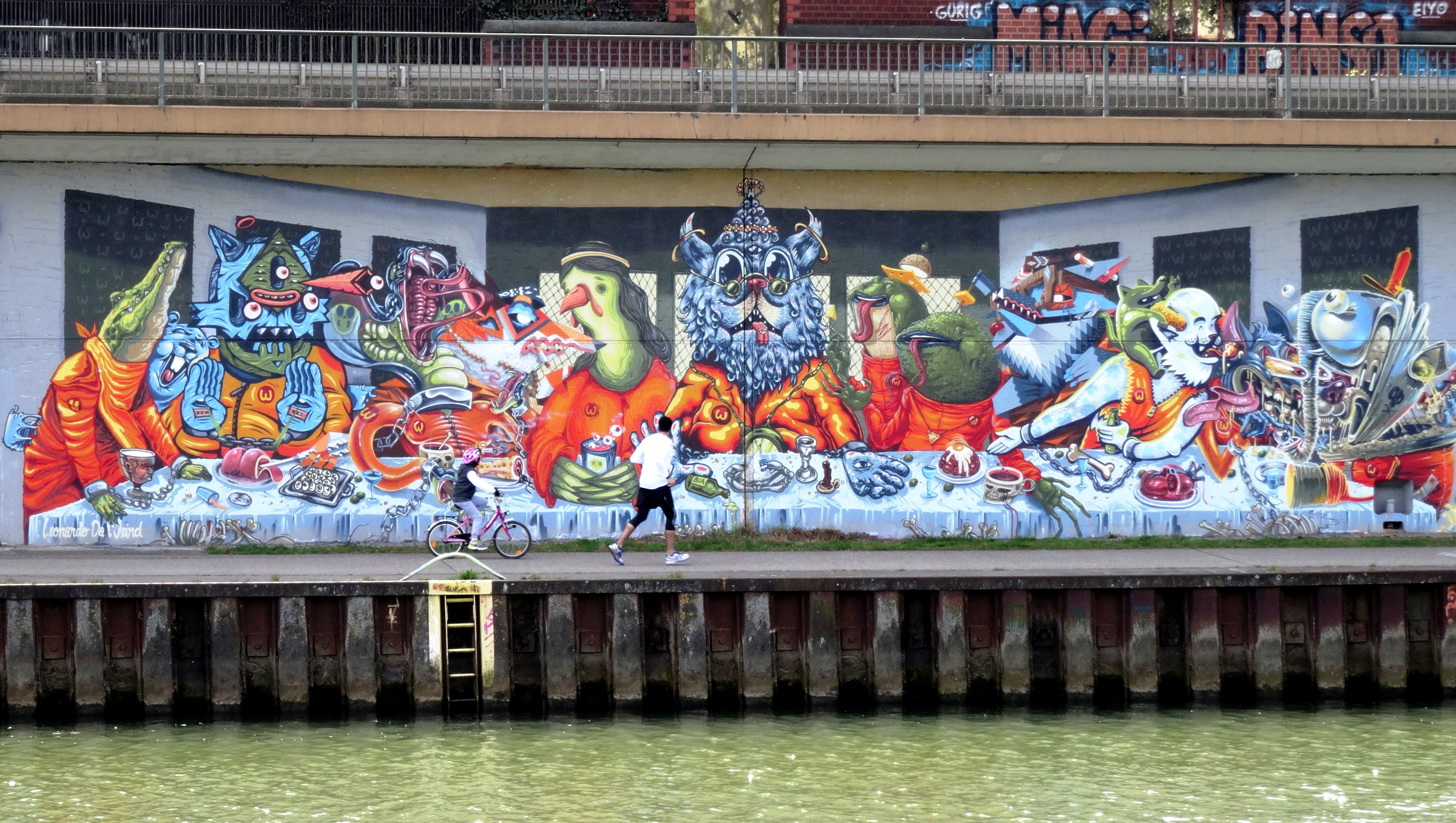 Graffito unterhalb der Saarbrücker Stadtautobahn (Verfremdung von Leonardo da Vincis "Abendmahl")